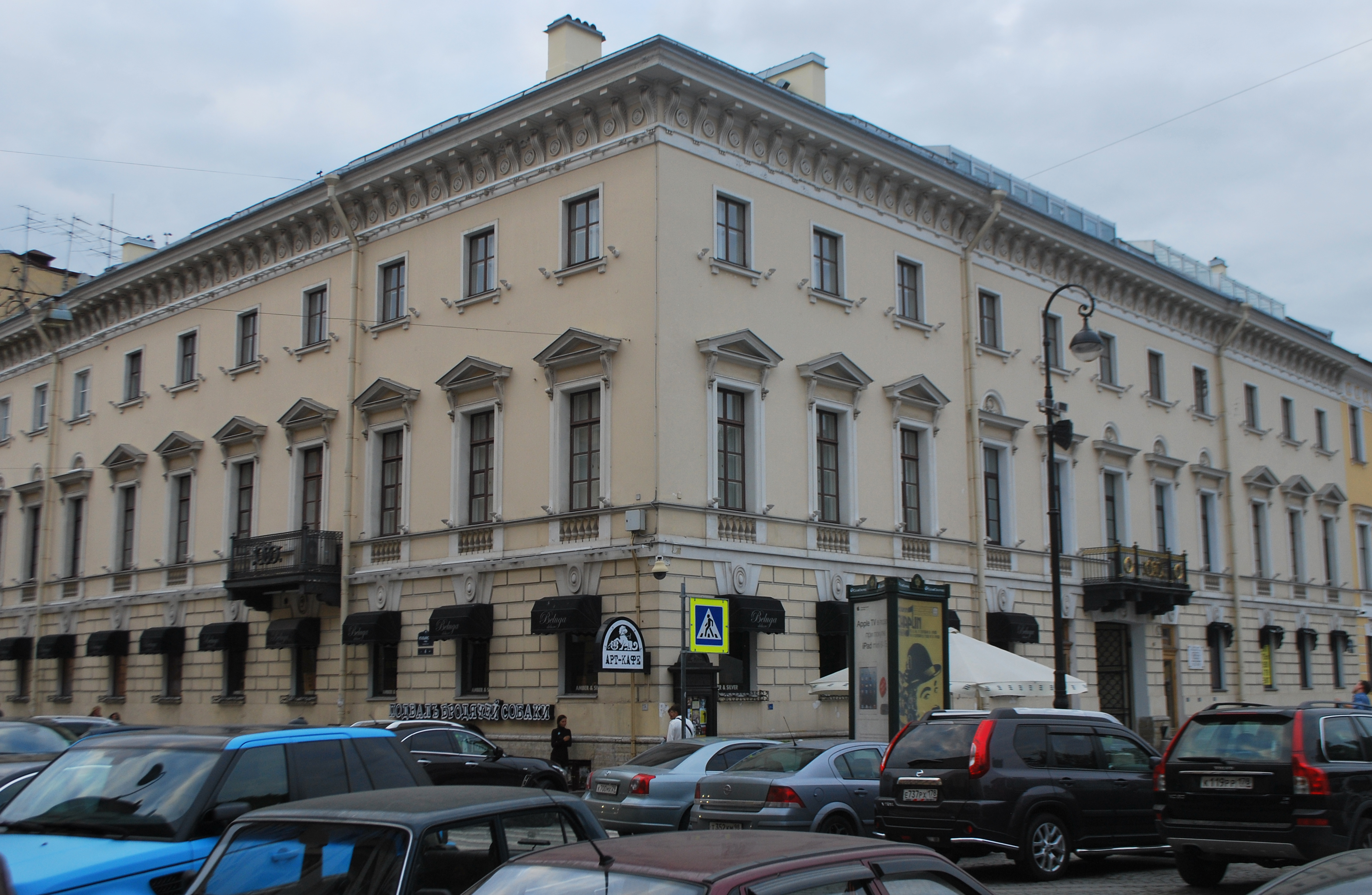 Дом Жако П. П. (Санкт-Петербург и Лен.область, Санкт-Петербург, Искусств площадь, 5, Итальянская улица, 4)